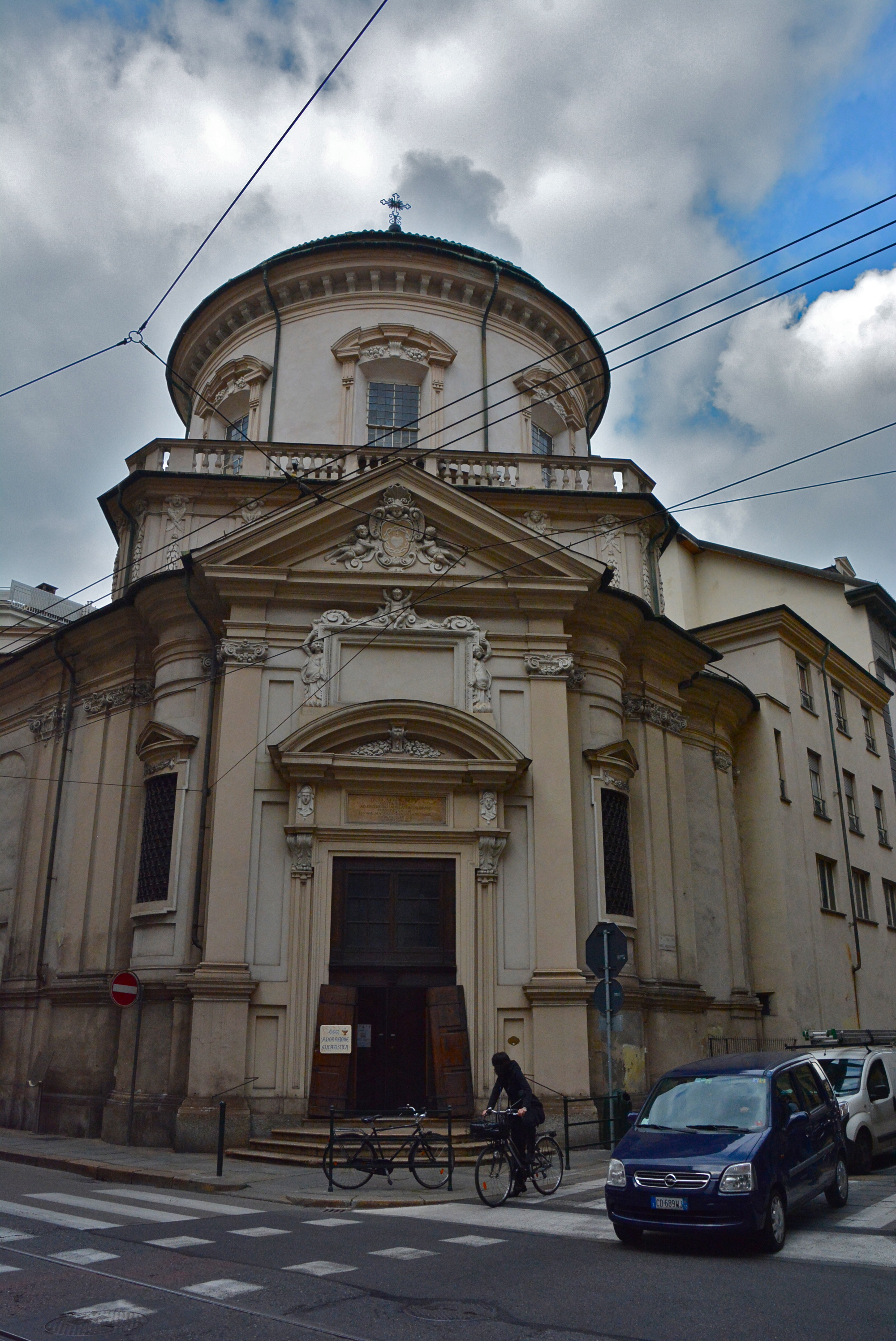 Chiesa della visitazione